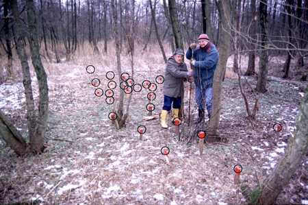 Bergung eines hölzernen Schiffsteils des 17. Jahrhunderts aus dem Tegelnoor bei Schleswig